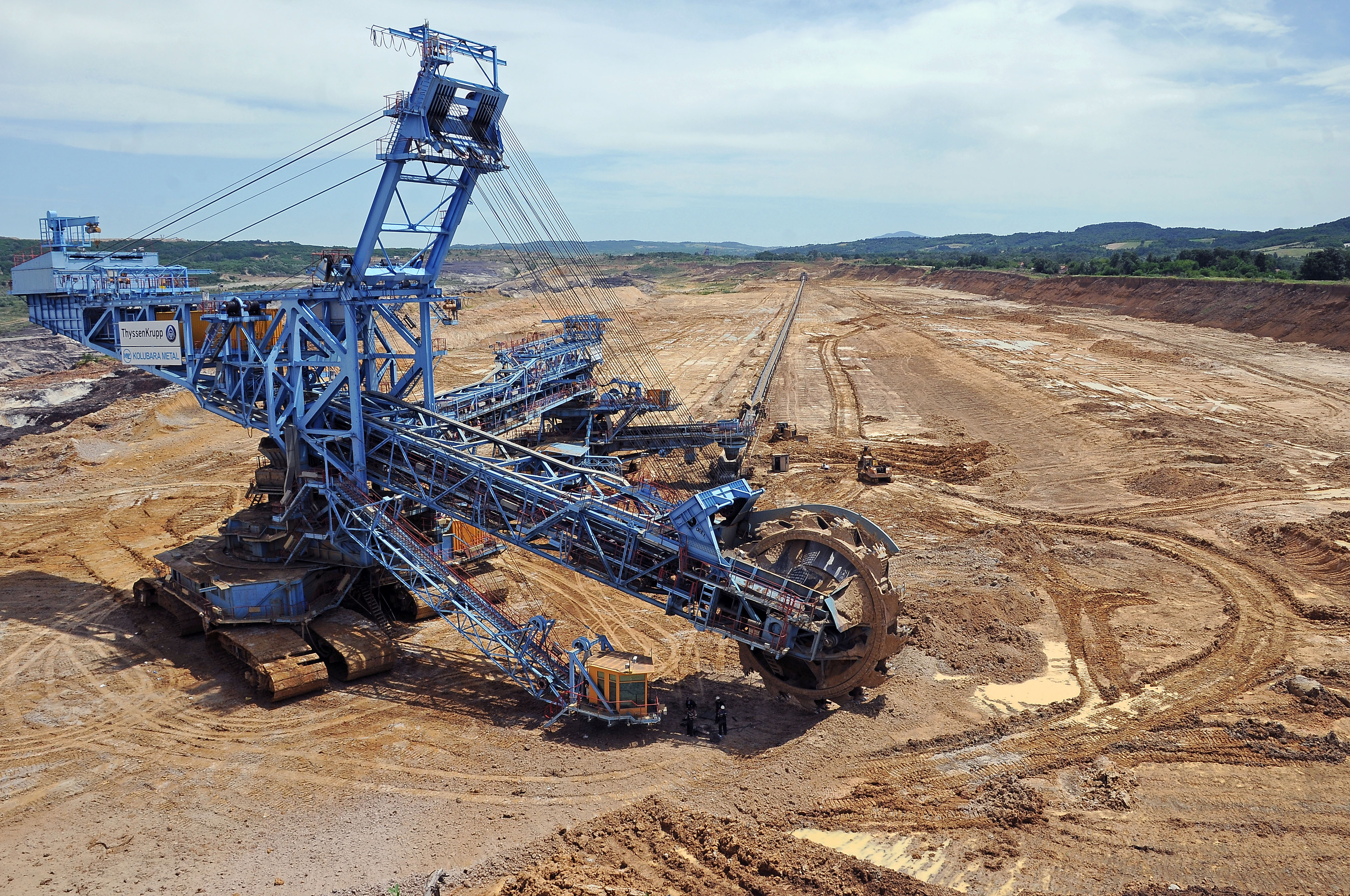 Srpski (latinica): Фотографију снимила и припремила Ивана Милијановић,студент Рударско-геолошког факултета Универзитета у Београду за потребе чланка на википедији